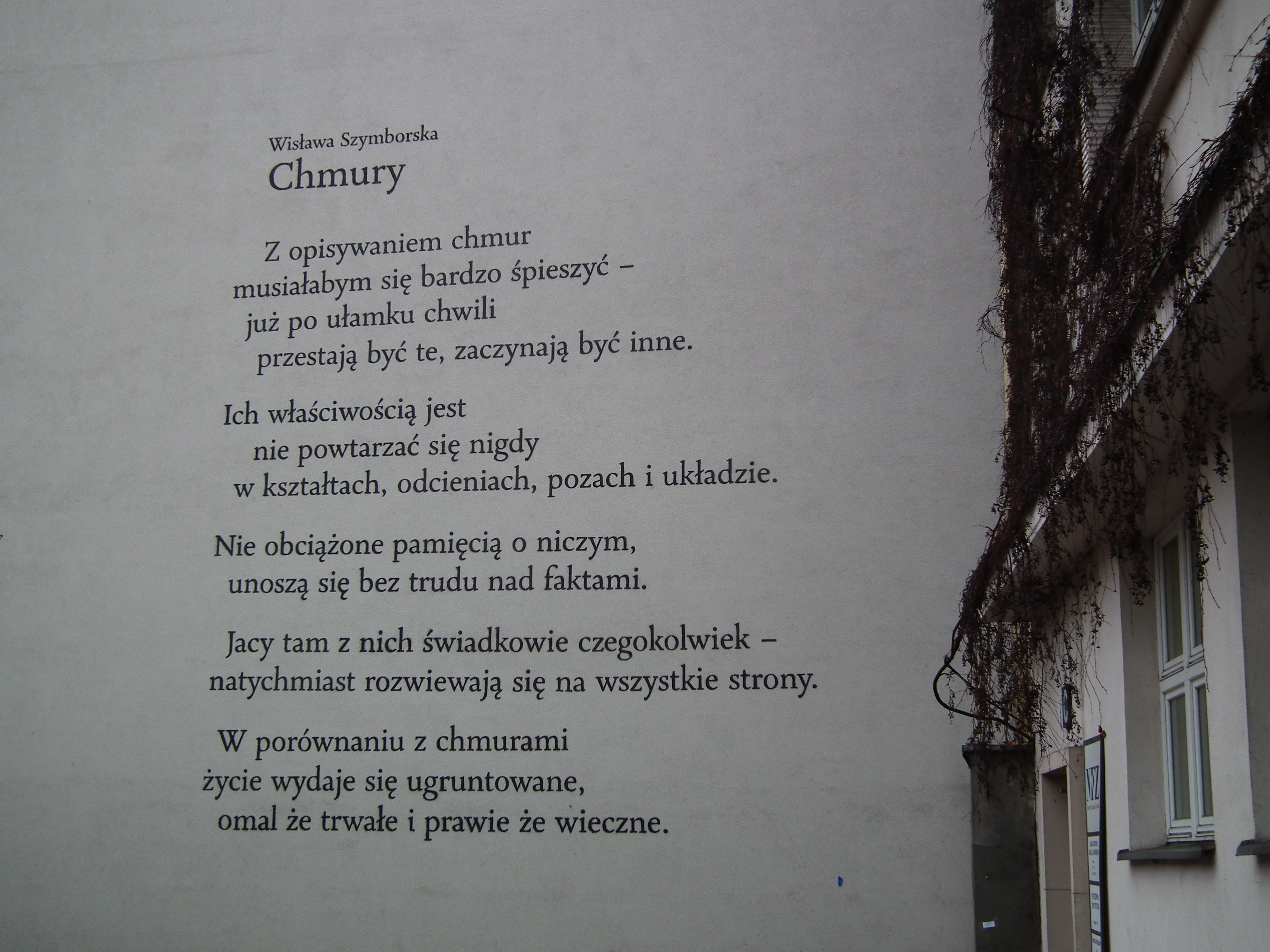 Mural na pl. Kolegiackim w Poznaniu.